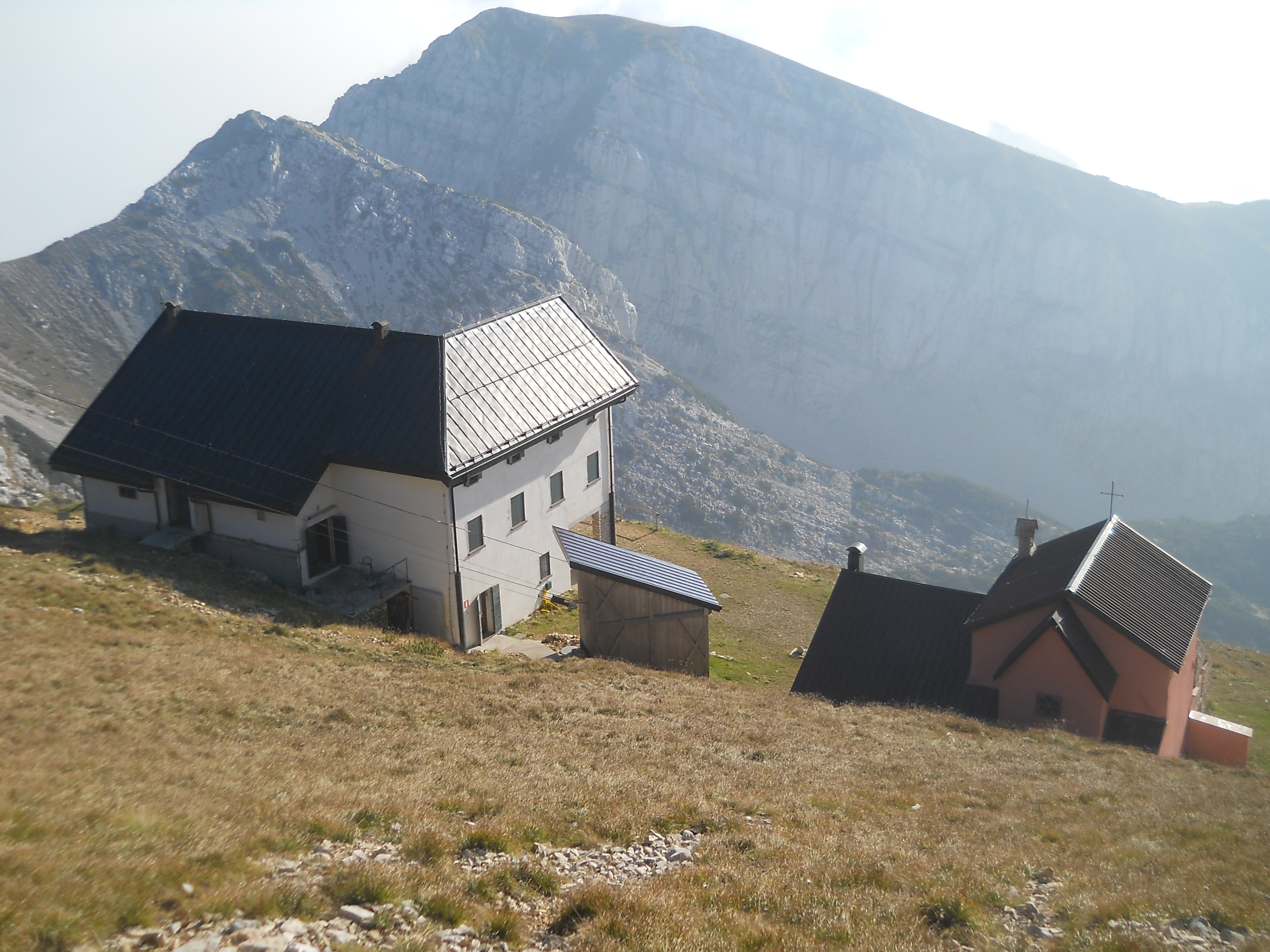 Rifugio Barana a Punta Telegrafo sul Monte Baldo, provincia di Verona.